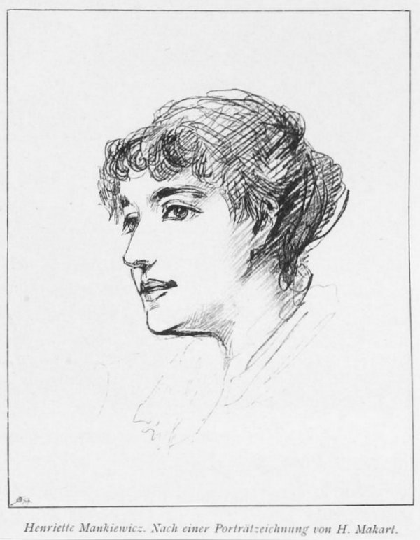 Portrait Henriette Mankiewicz, Abbildung aus Die graphischen Künste, 1899